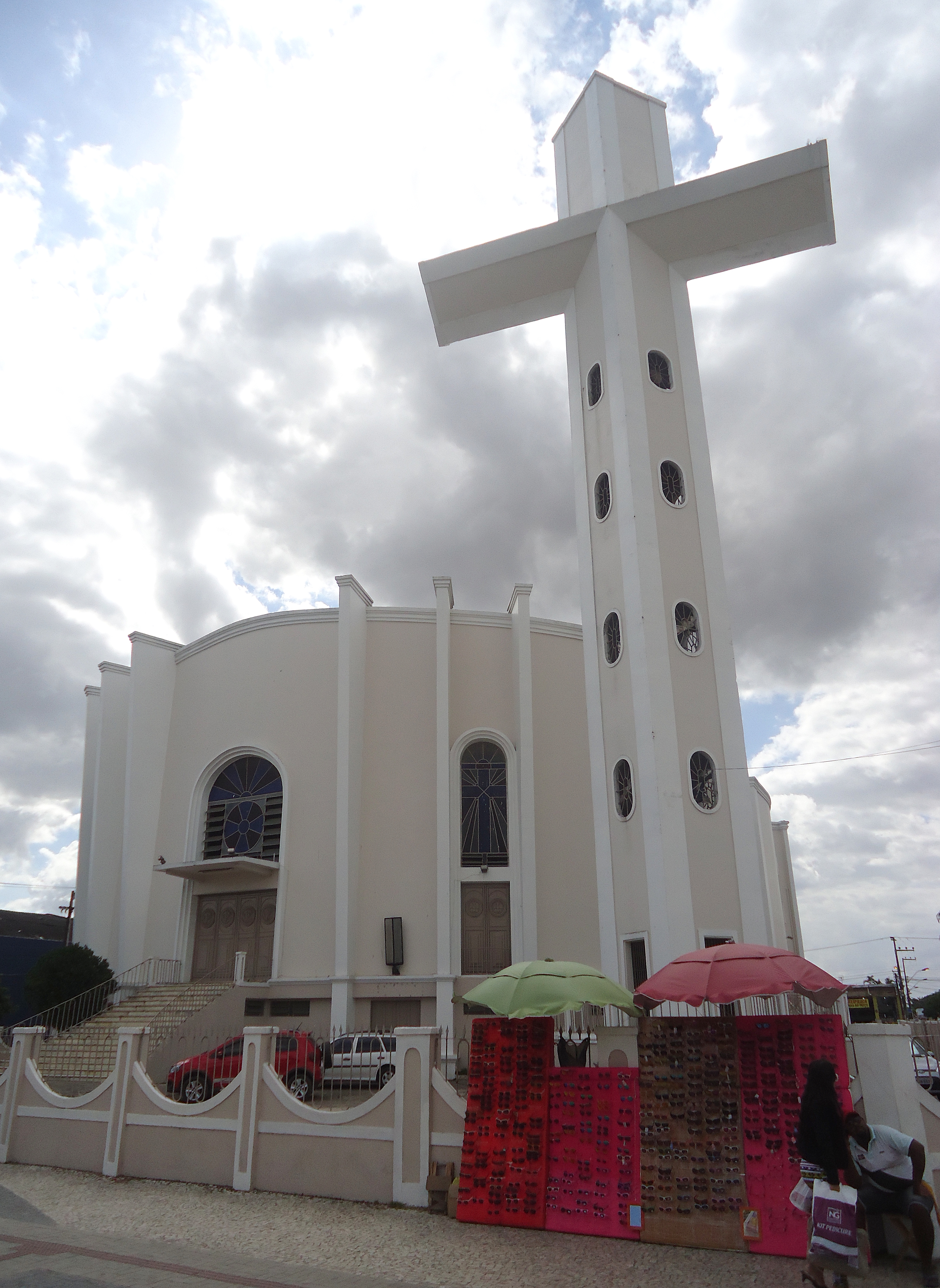 Igreja Matriz Arapiraca